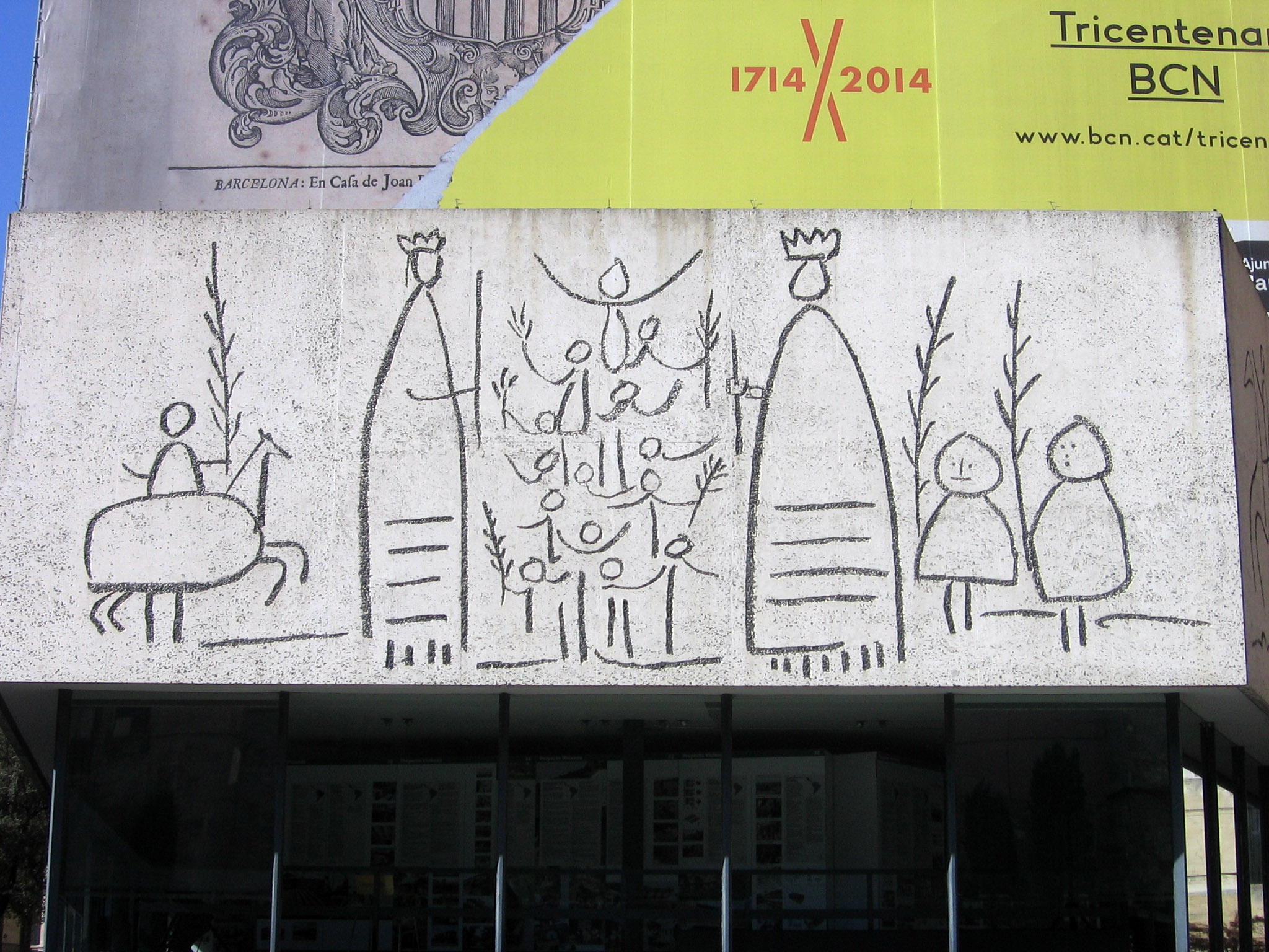 Friso del Colegio de Arquitectos de Cataluña (1962), de Pablo Picasso, Plaza Nueva.